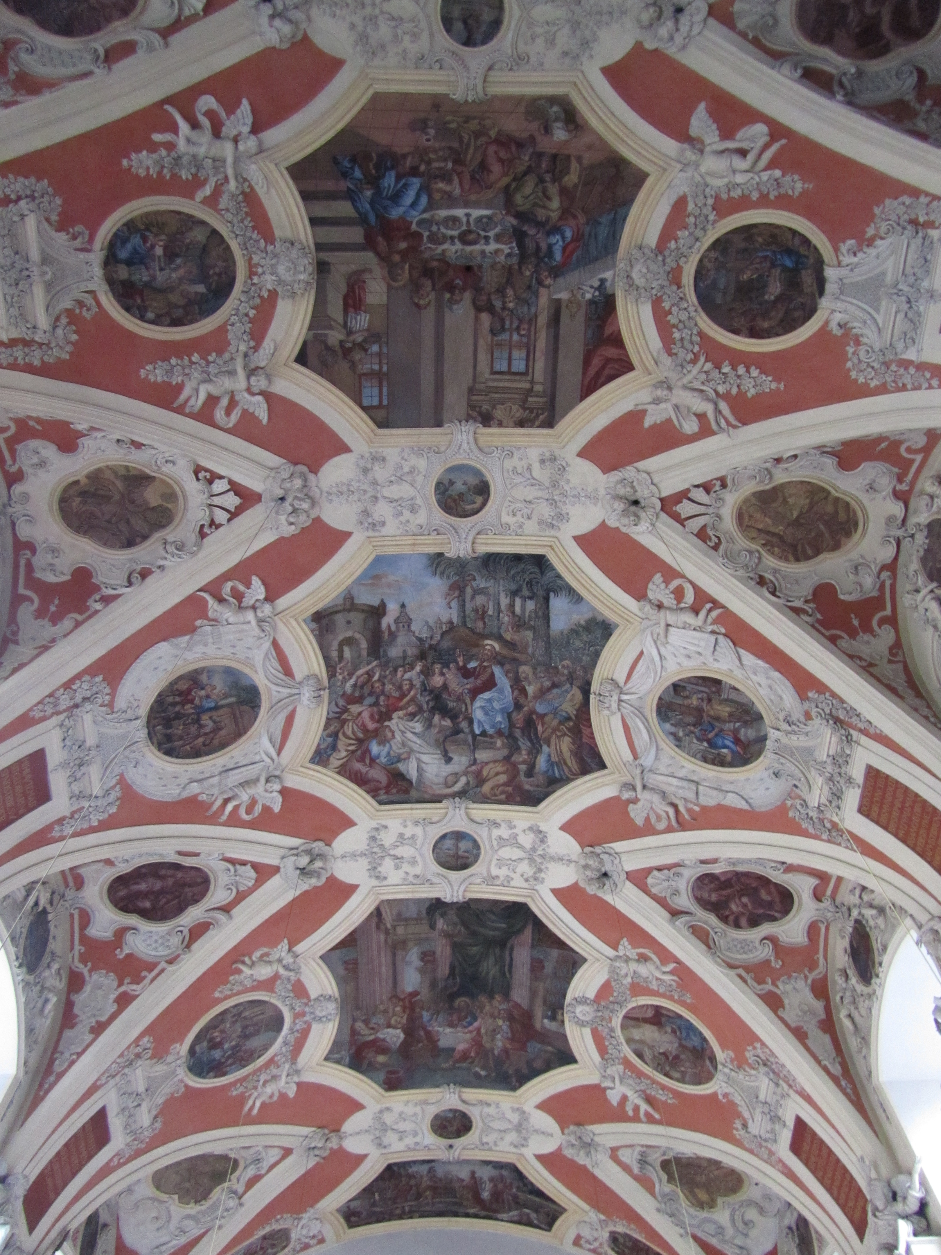 Die barocke Deckenbemalung der Cruciskirche/Neuwerkskirche in Erfurt.